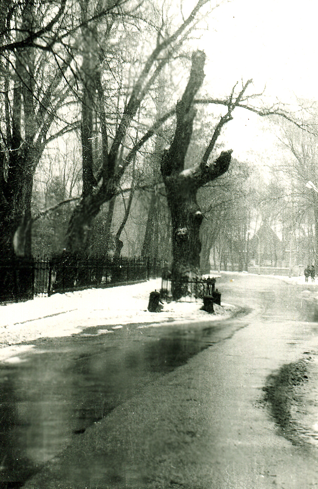 Одна из последних фотографий дуба Петра Великого. Каменный остров. С.-Петербург